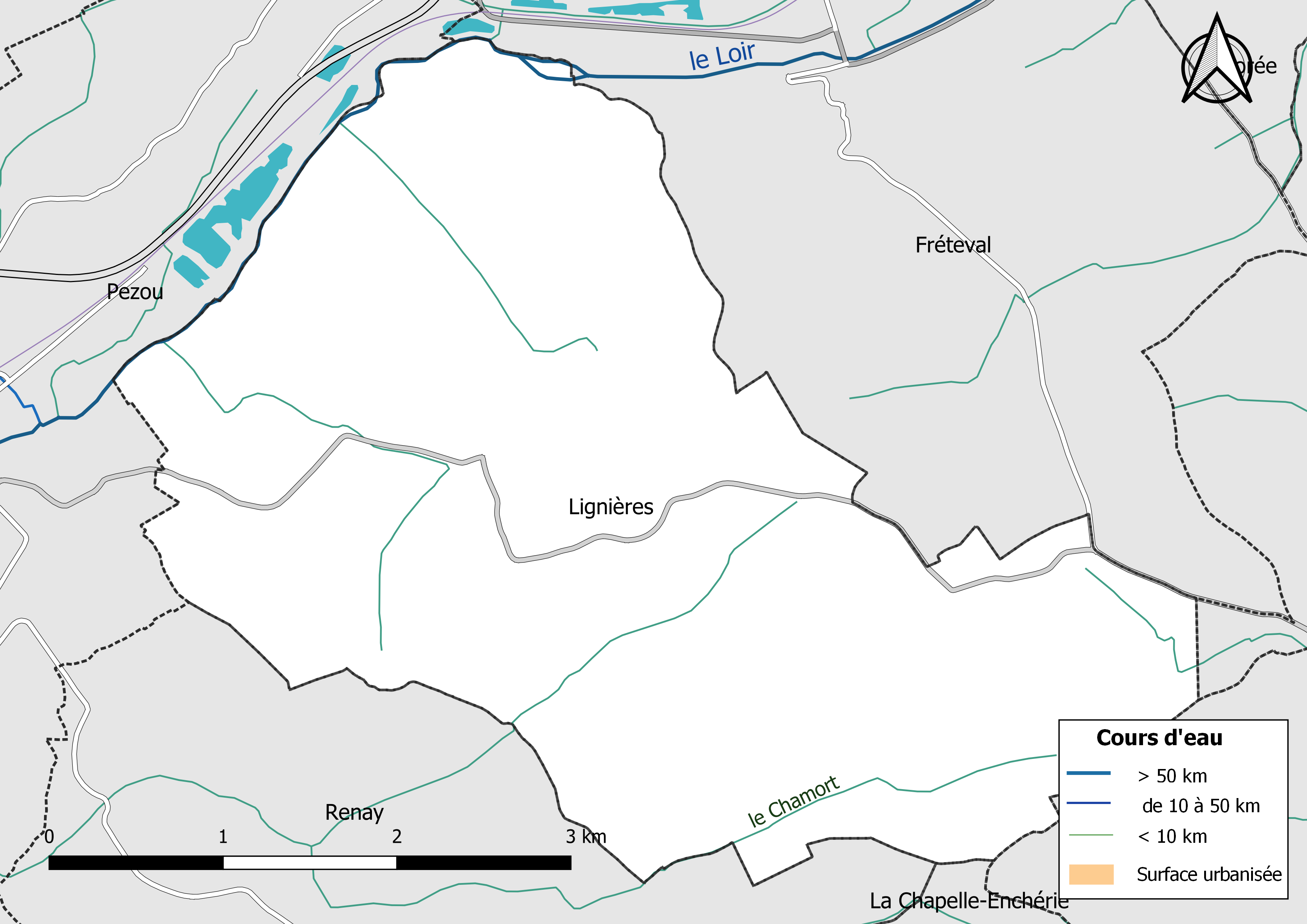 Carte du réseau hydrographique de la commune de Lignières (Loir-et-Cher) (France).